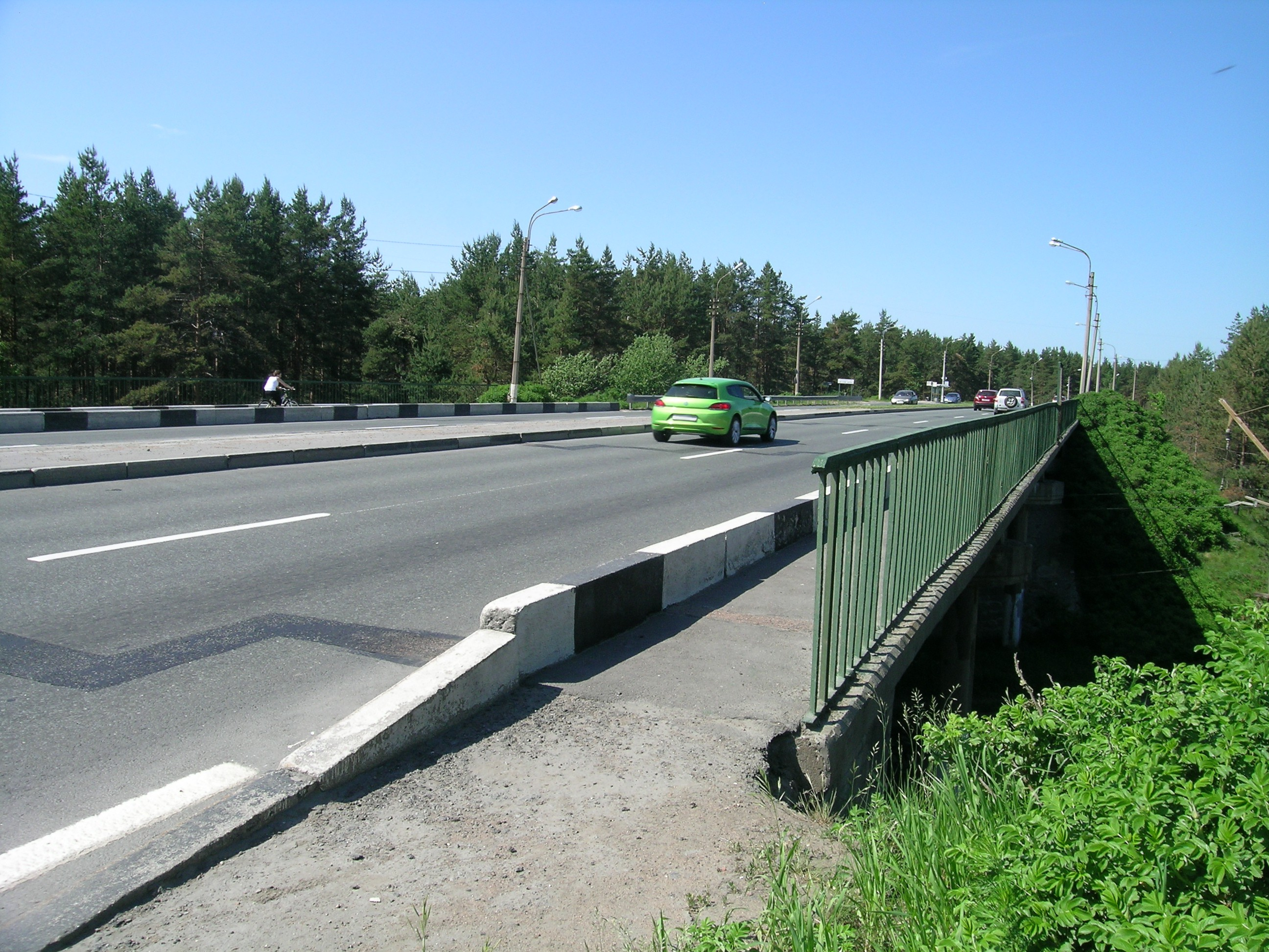 Автомобильный мост на Приморском шоссе над железнодорожными путями перегона Курорт—Белоостров.